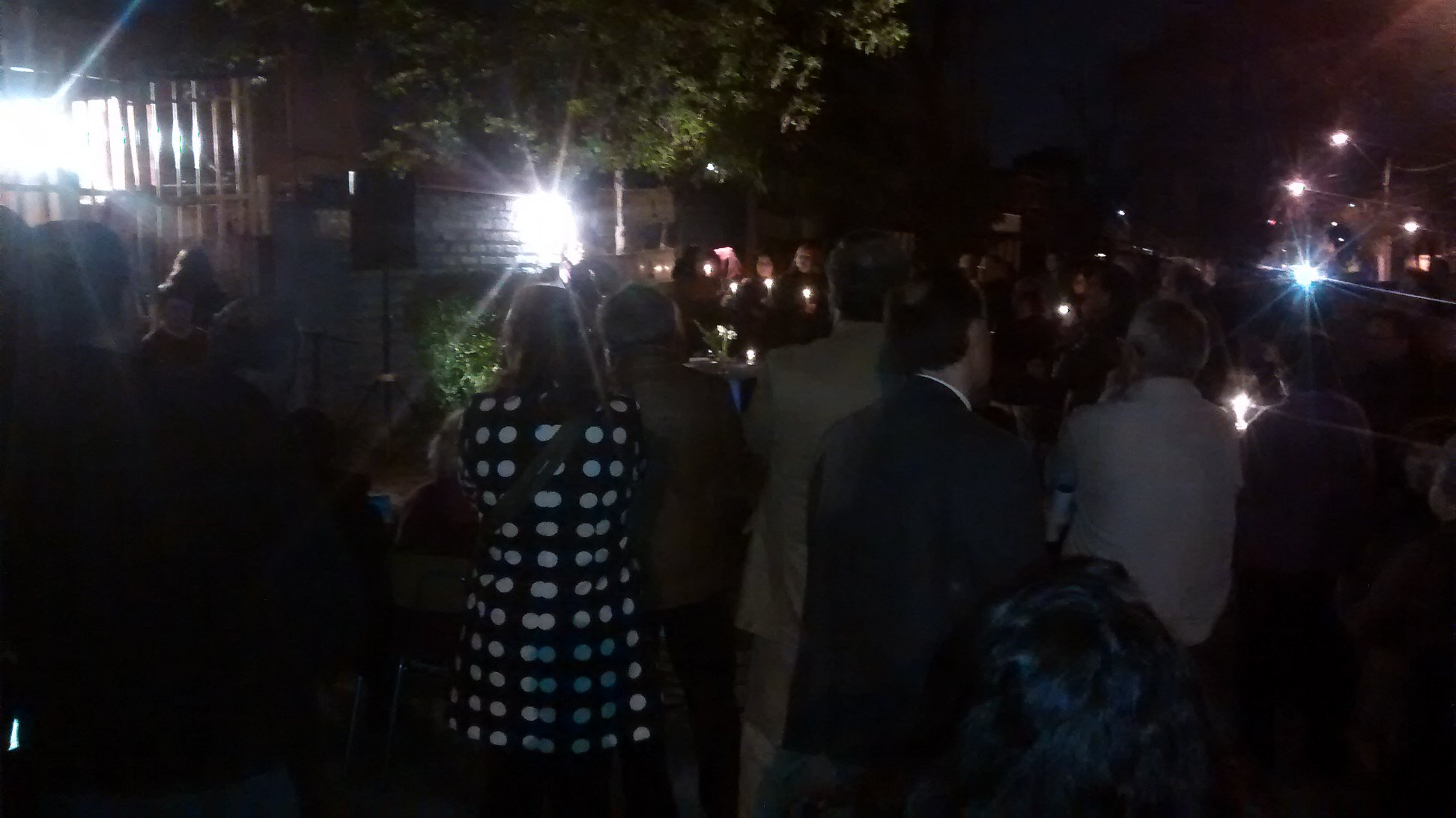 Acto conmemorativo e inauguración de monumento en el Ex Centro de Detención Clandestino Nido 18, ubicado en el paradero 18 de La Florida. Santiago de Chile